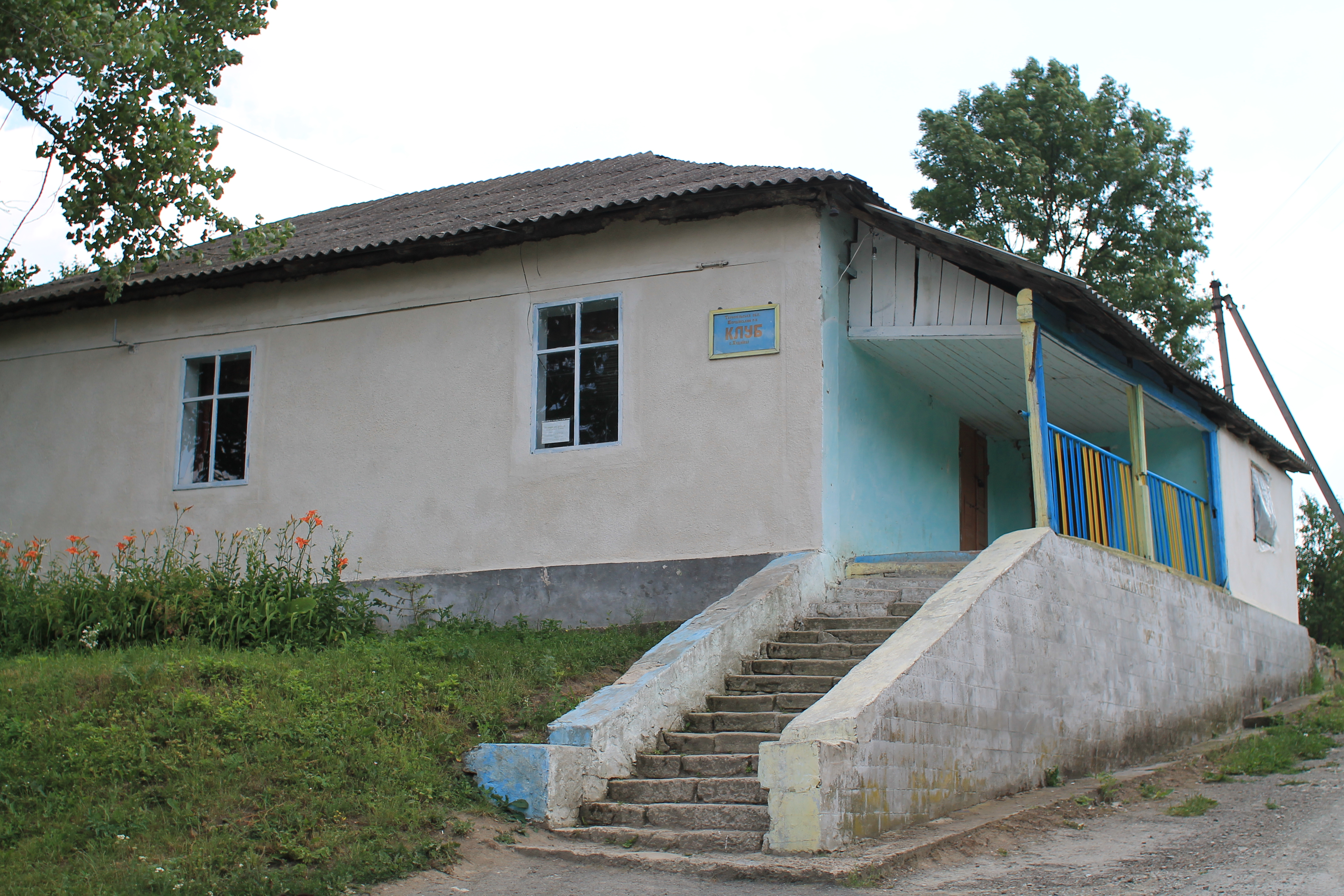 Худиївці, клуб, 2